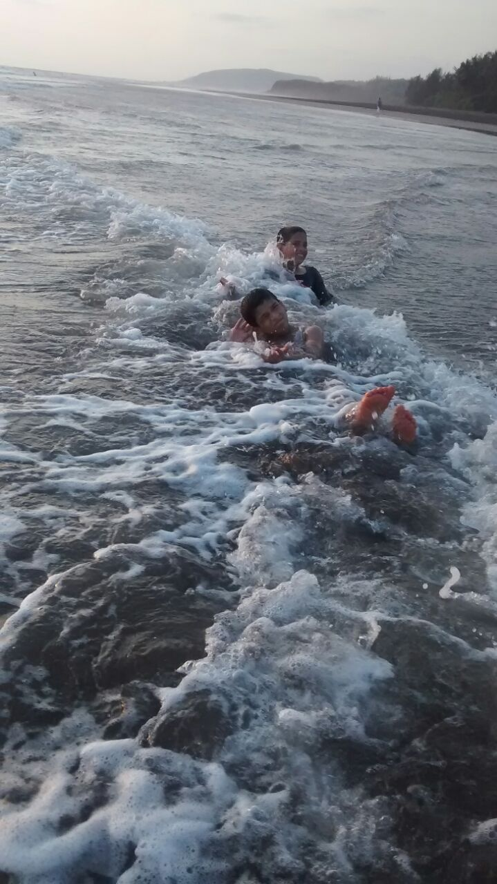 आंजर्ले येथील रम्य समुद्रकिनारा